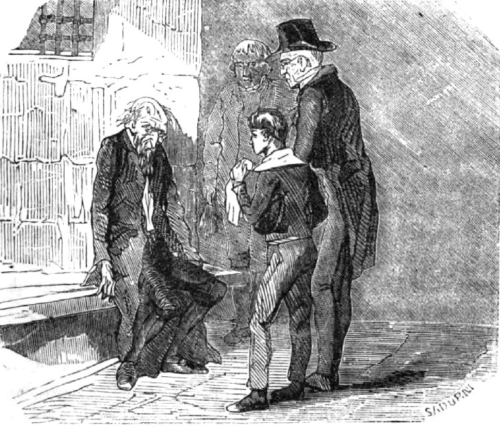 Imagen de la página 3 de la Traducción de 1857 de "Oliver Twist", cuyo título fue traducido como "Los ladrones de Londres"